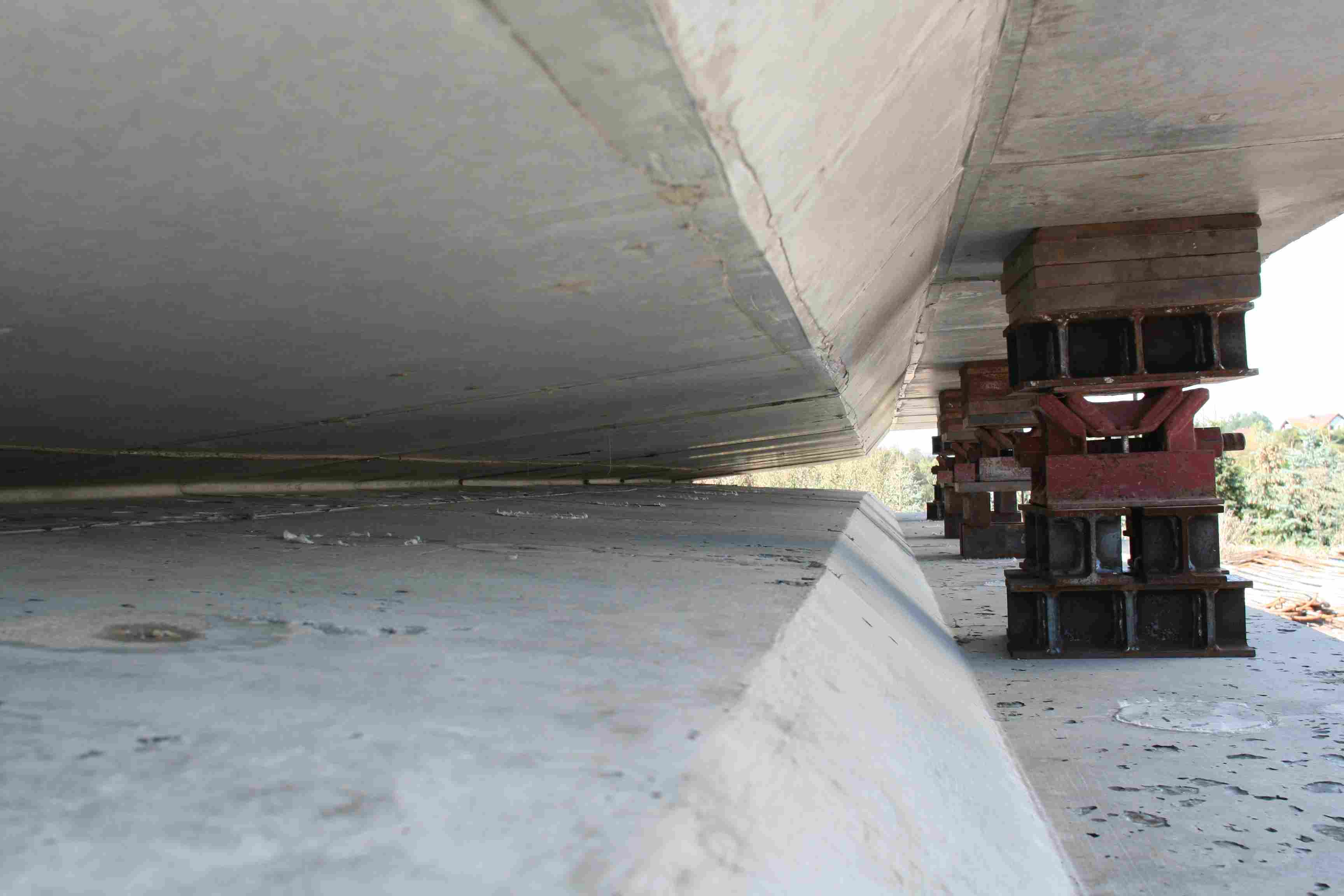 Talbrücke Weißenbrunn am Forst Probekörper des Betongelenks